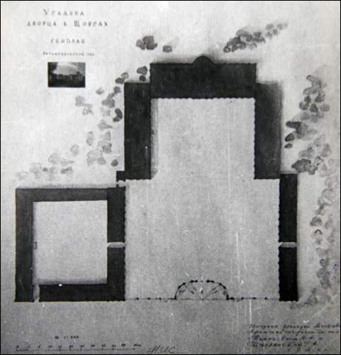 План палацавага комплексу (абмерныя чарцяжы 1946 г.)